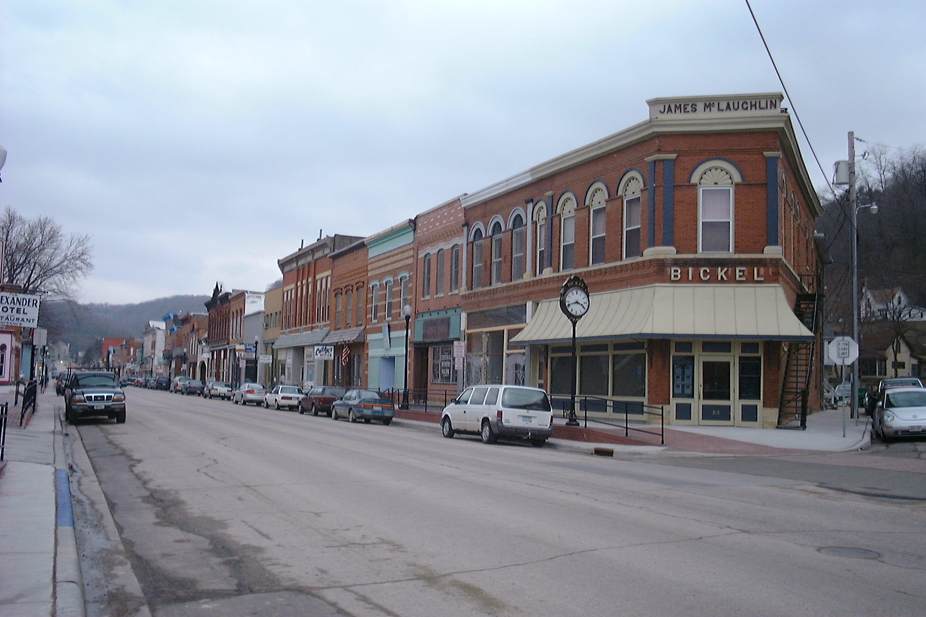 McGregor, Iowa